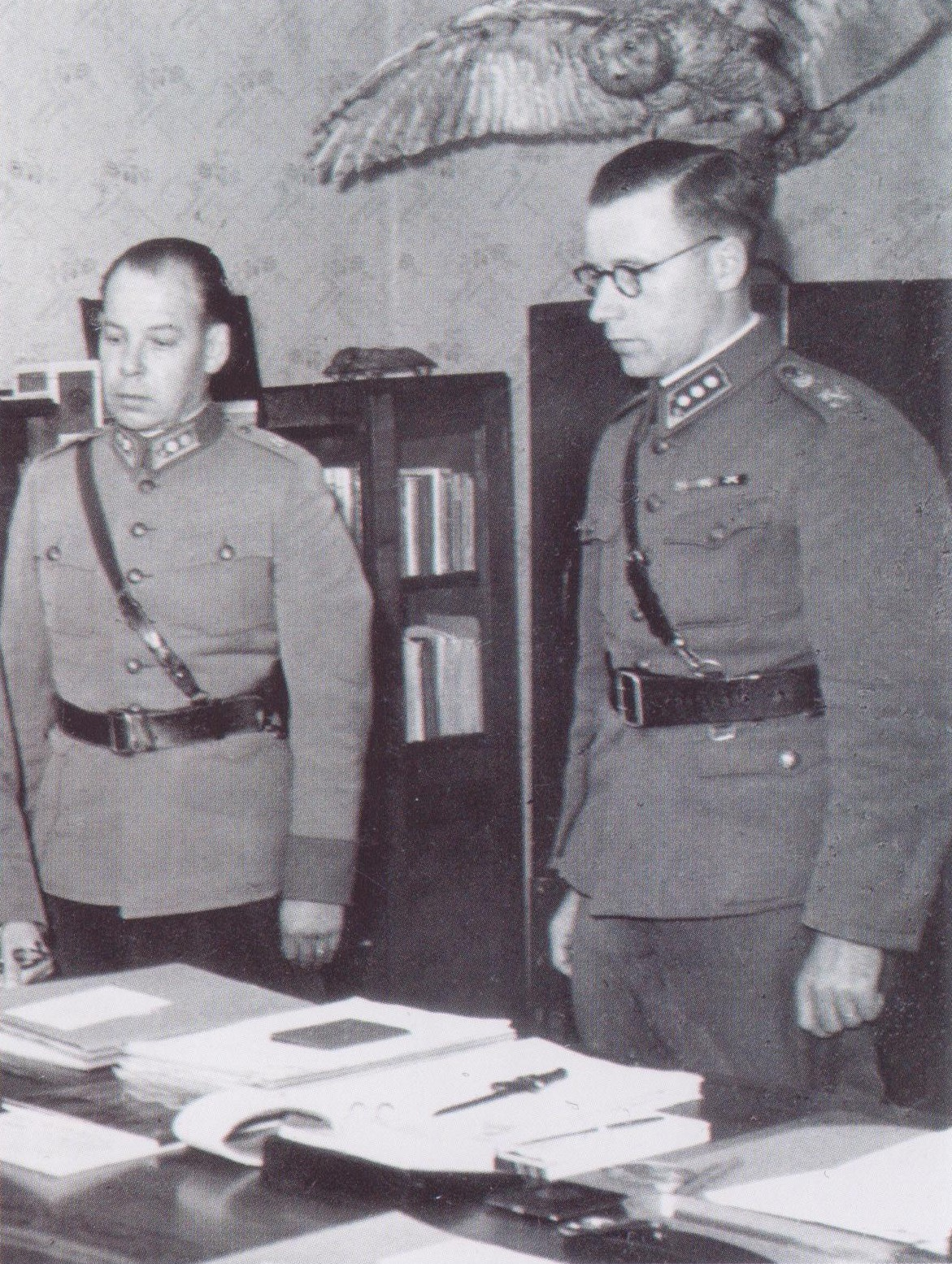 Ylipäällikkö Mannerheimin adjutantit ylipäällikön työhuoneessa. Vasemmalla seisoo vanhempi adjutantti everstiluutnantti Ragnar Grönvall ja oikealla nuorempi adjutantti kapteeni Osvald Rafael Bäckman.